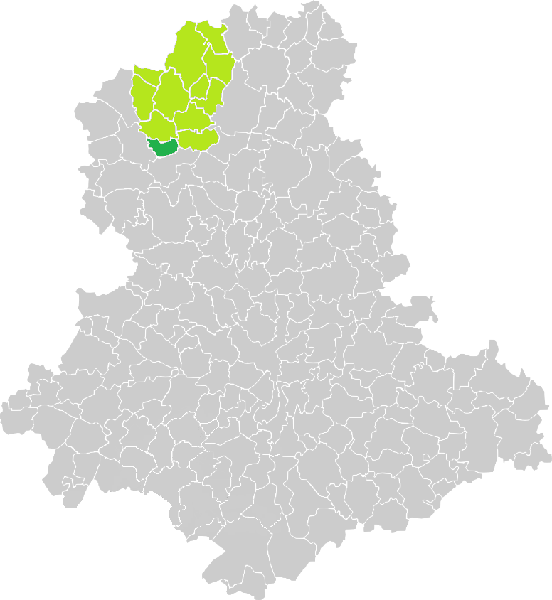 Carte de situation de la commune de La Croix-sur-Gartempe (en vert foncé) dans le votre Canton (en vert clair) sur une carte des communes de la Haute-Vienne